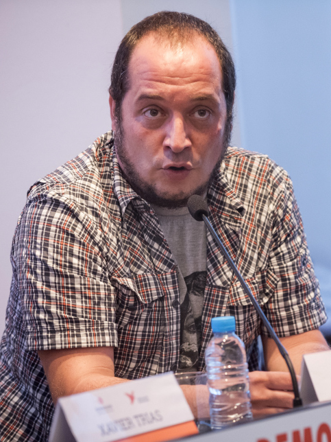 Presentem el nou projecte 'Crida per la Democràcia', una iniciativa que apel·la tots els demòcrates i que va molt més enllà de l'entitat.